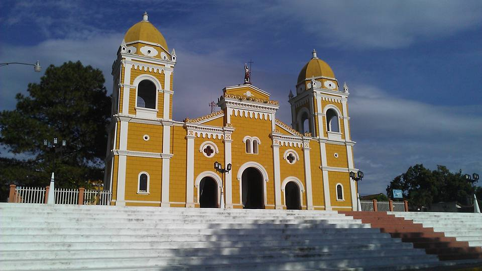 Iglesia Parroquia San Juan Buatista Masatepe